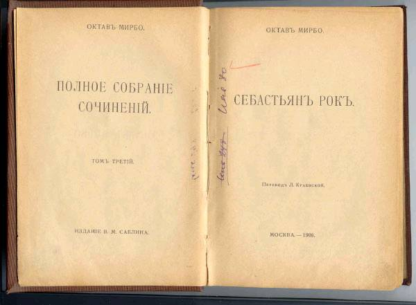 Couverture de la traduction russe de Sébastien Roch d'Octave Mirbeau (1848-1917)